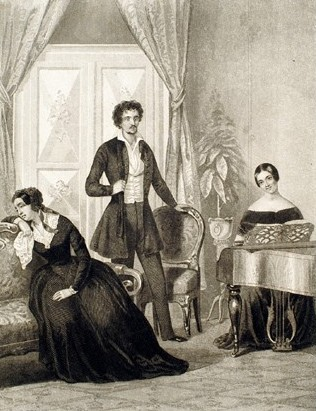 A zongorajelenet Czakó Vilmos: Végrendelet című drámájából. Nemzeti Színház 1845. aug. 21. A képen: Laborfalvi Róza, a későbbi Jókainé mint Gróf Alpáriné, id. Lendvay Márton mint Gróf Táray Béla, Komlóssy Ida mint Antónia. Tyroler József acélmetszete